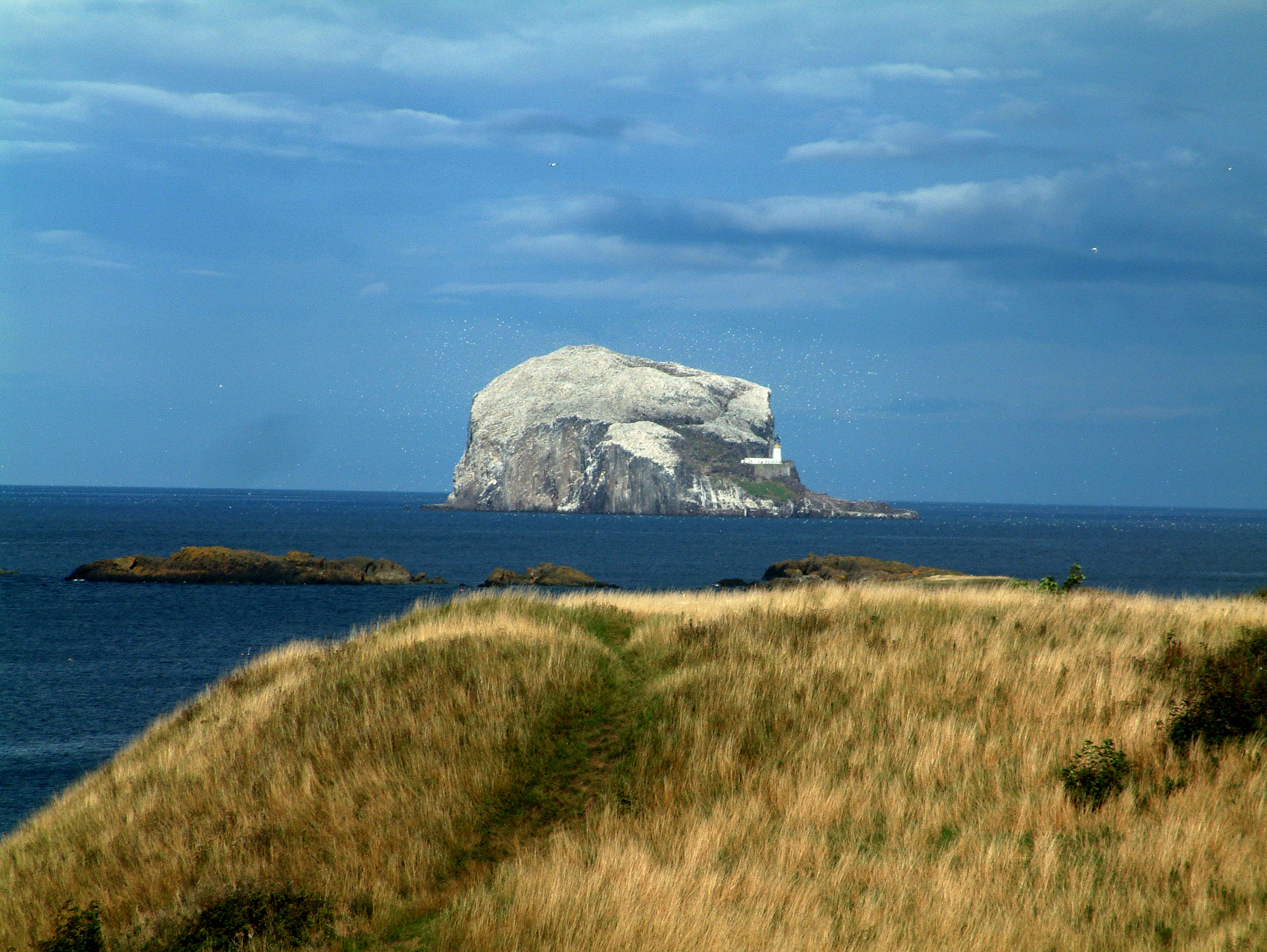 Bass Rock (island), Scotland. Skalní ostrov Bass Rock ve Skotsku. foto vlastni 2006